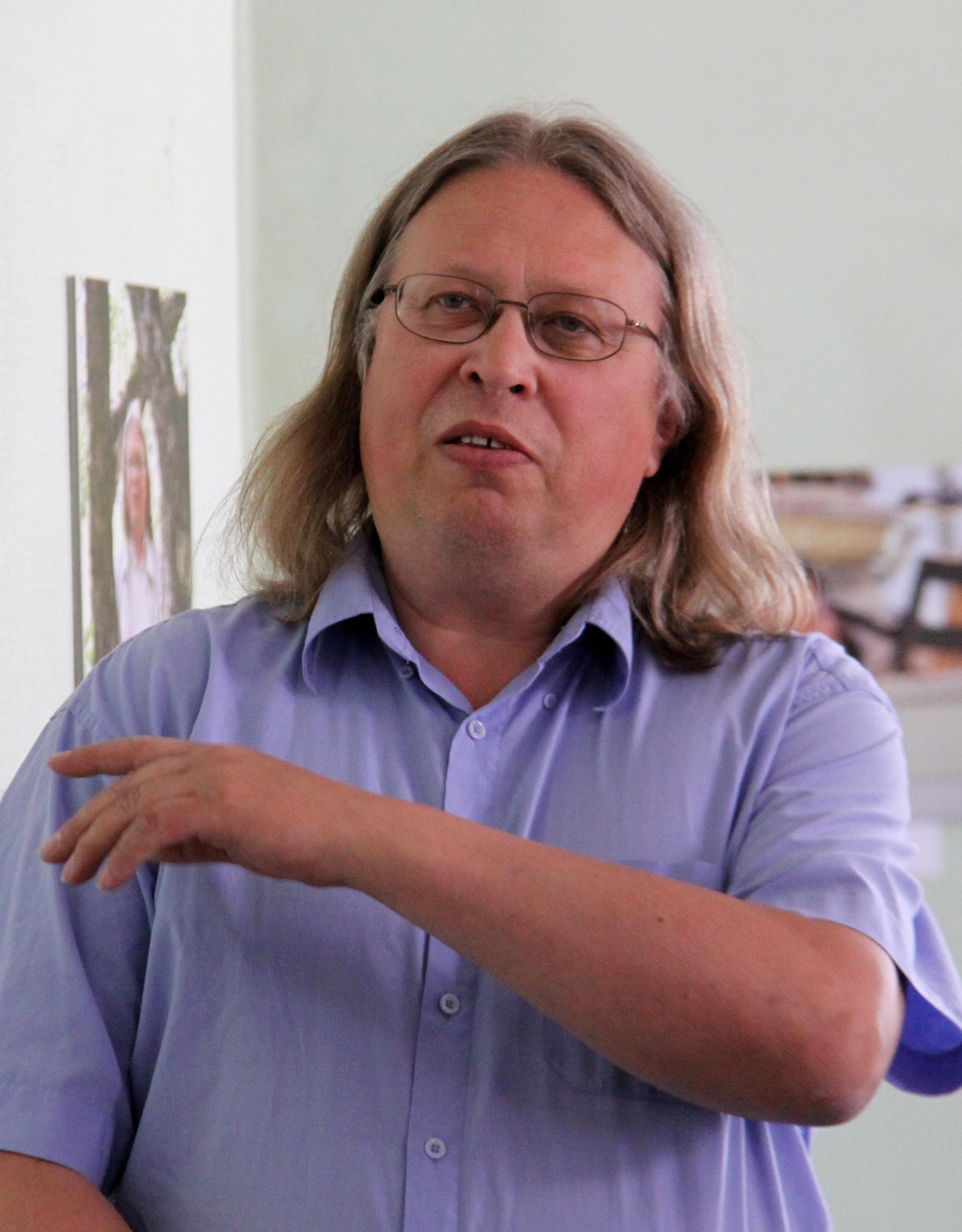 Andres Uibo Suure-Jaani Muusikafestivali fotonäituse avamisel Suure-Jaanis Köleri 2